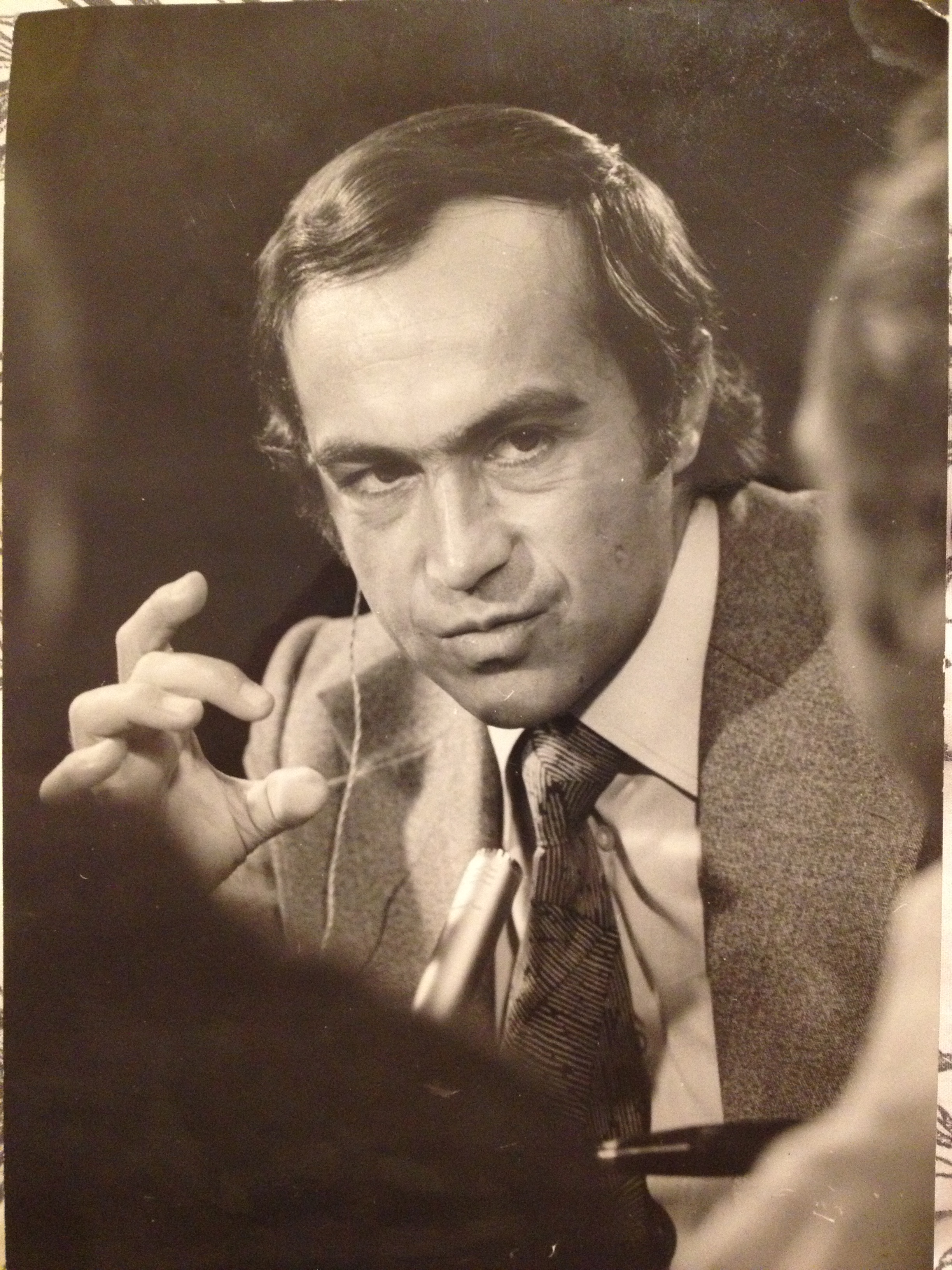 Васил Марков в ефир